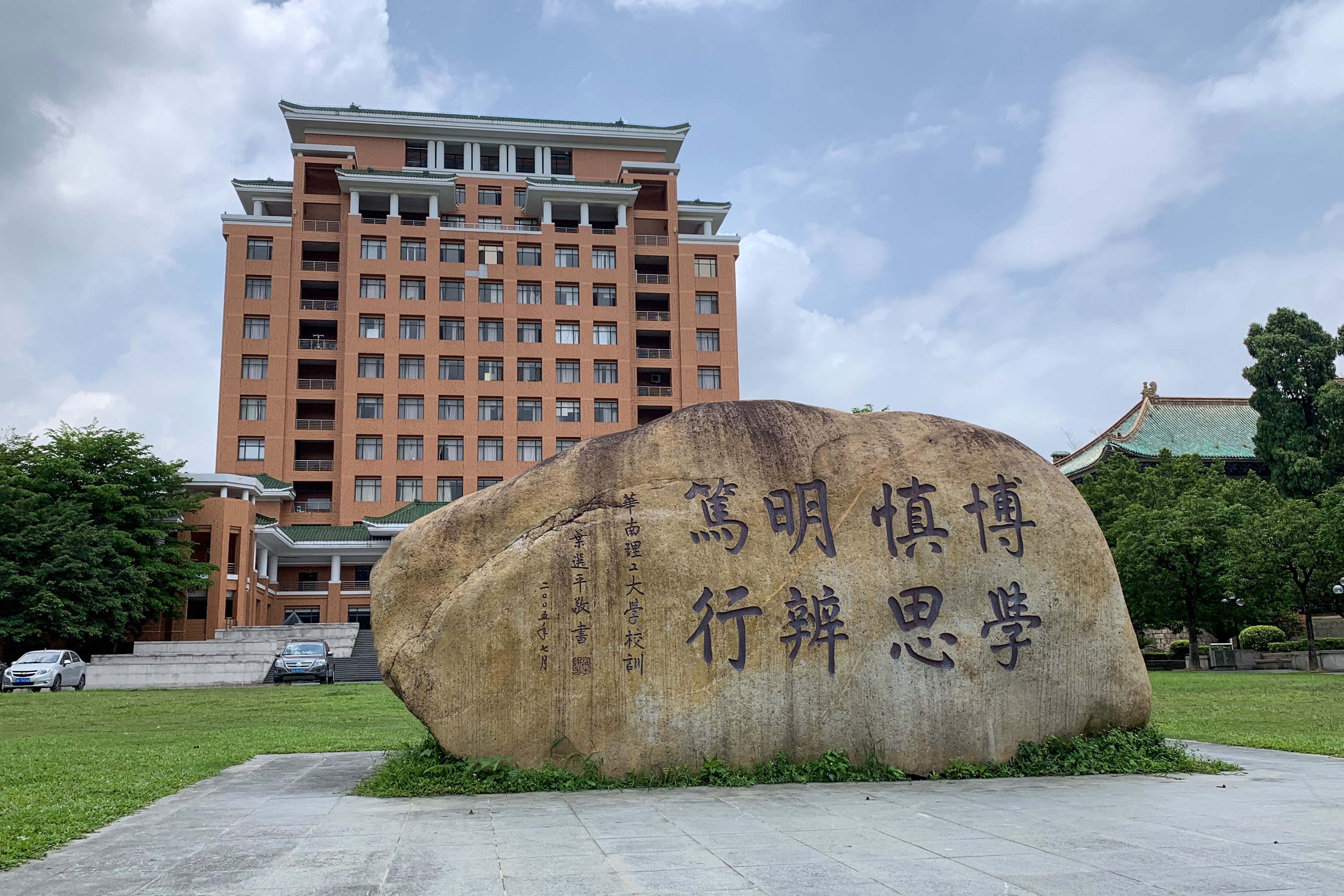 位于华南理工大学五山校区的新校训石，后侧为励吾科技大楼